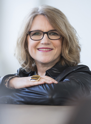 Ines Witka Portrait